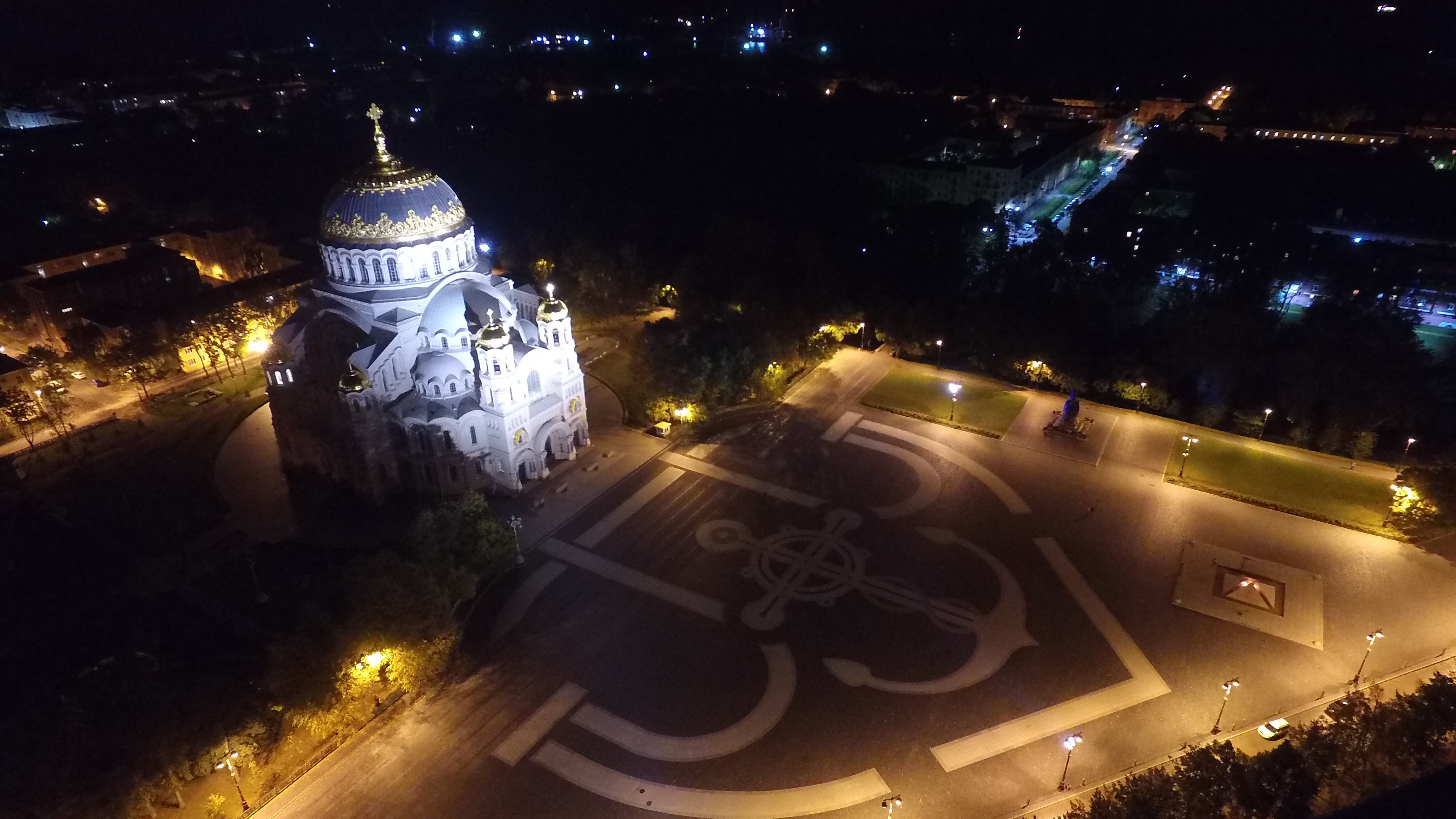 Собор Никольский Морской: Якорная площадь, 5, Кронштадт, Кронштадтский район, Санкт-Петербург